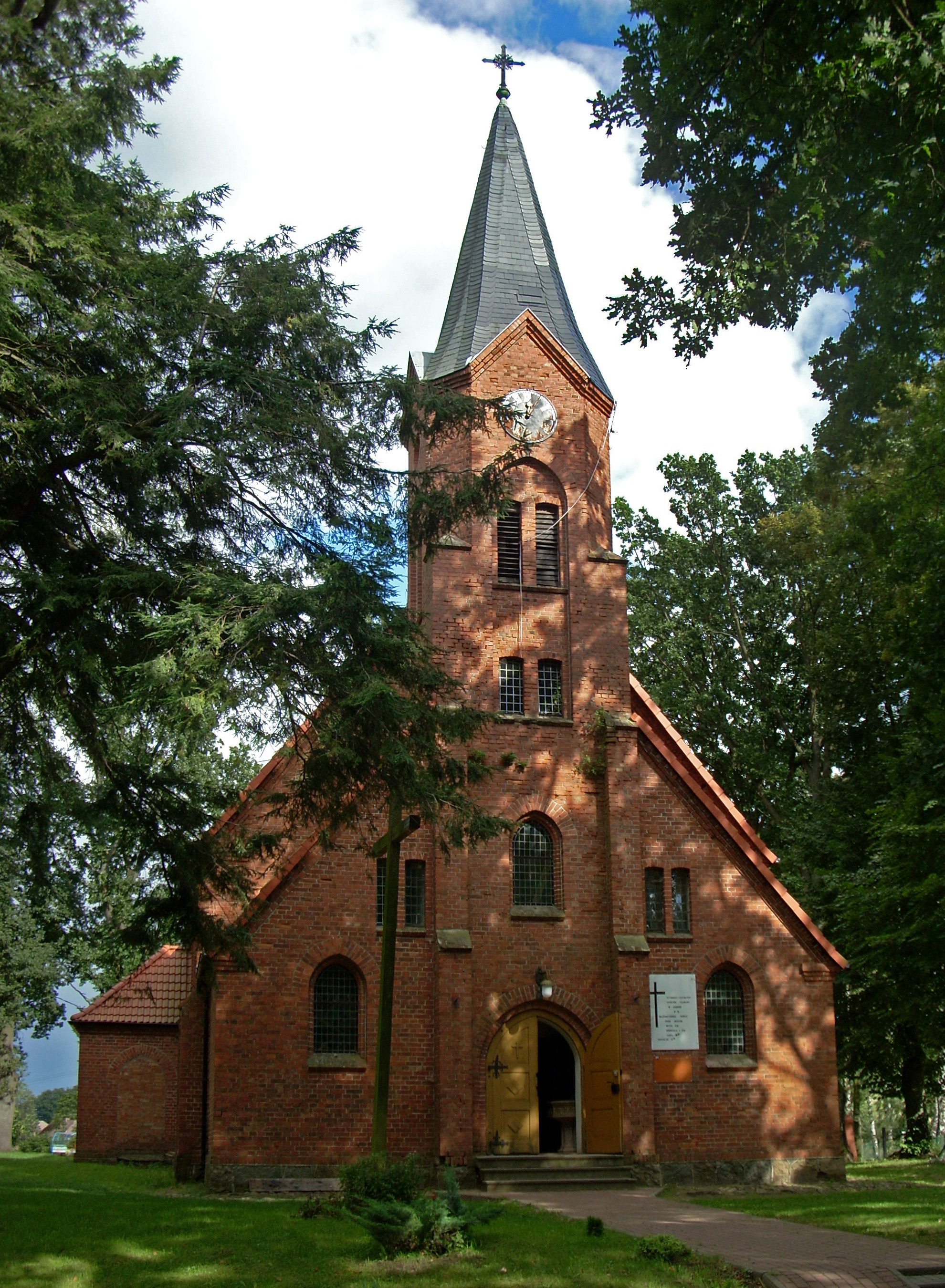 Gąbino - dawny kościół ewangelicki, obecnie rzymskokatolicki filialny p.w. Najświętszego Serca Jezusowego, 1913-1914